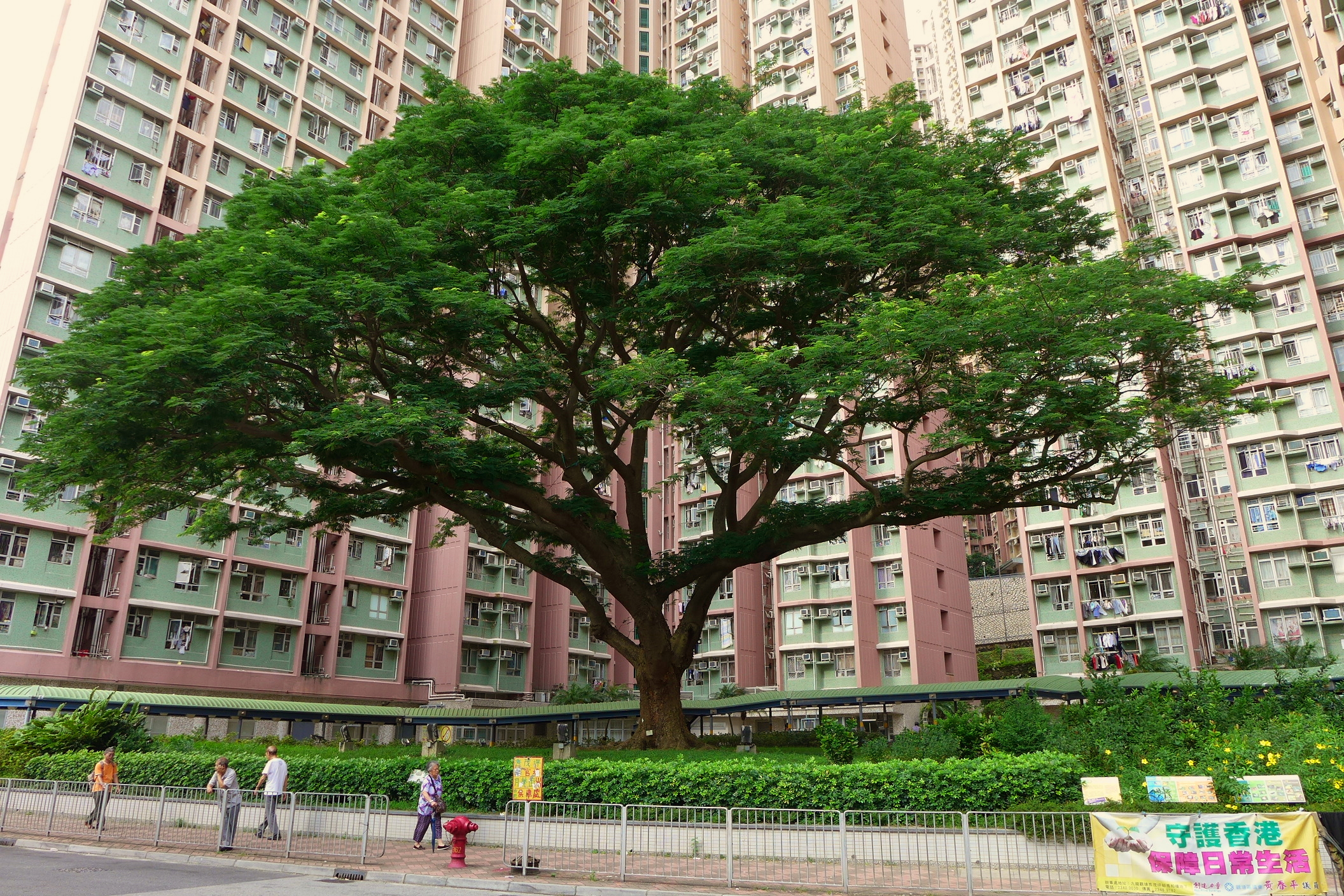 Sau Mau Ping Estate Big tree